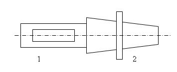 ультразвуковая головка